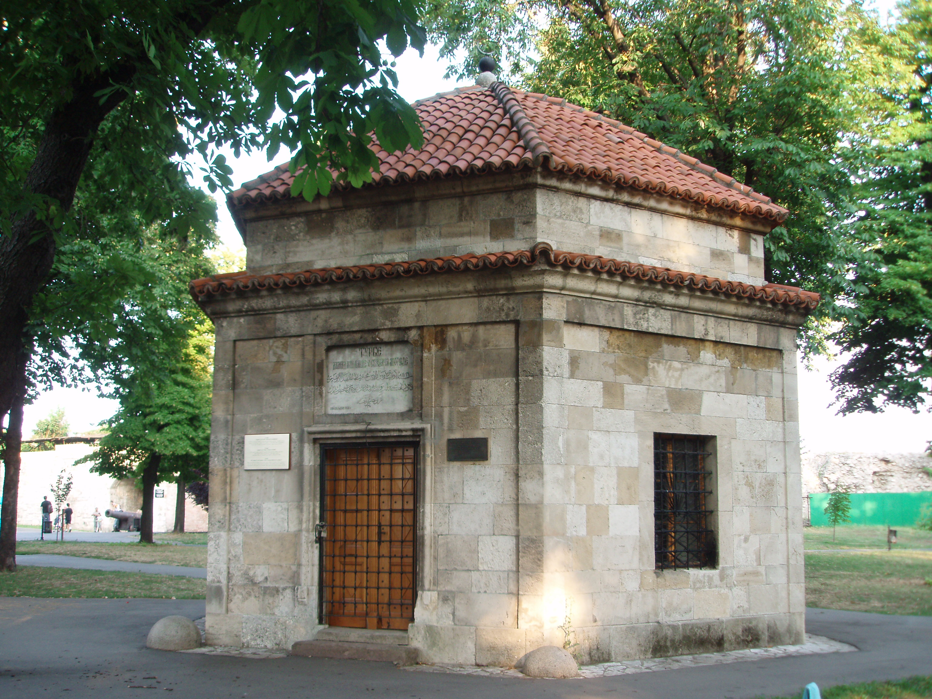 Kalemegdan - Damad Ali – pašino turbe